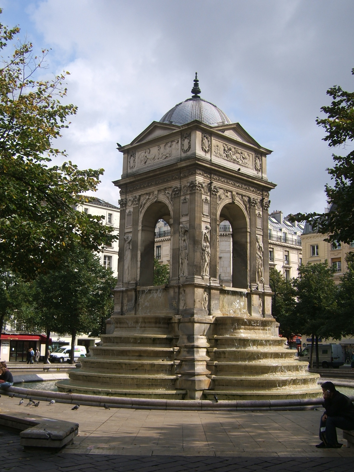 Fontaine des Innocents (Paris, France) .